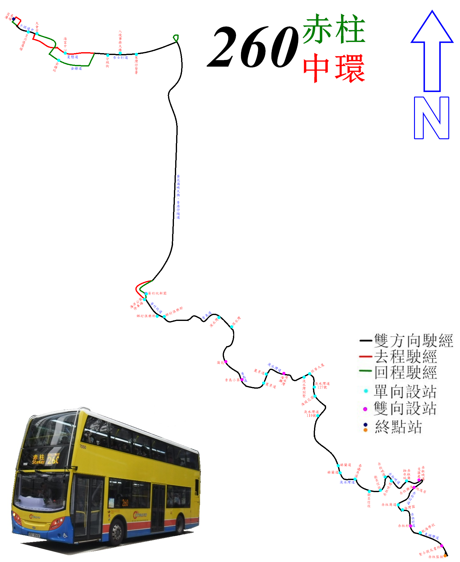 中文（香港）: 城巴260線的走線圖